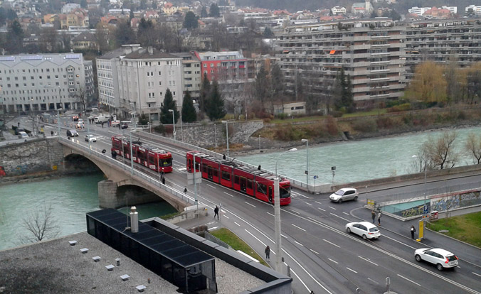 Probefahrt Straßenbahn Innsbruck vor Betriebnahme der Westachse